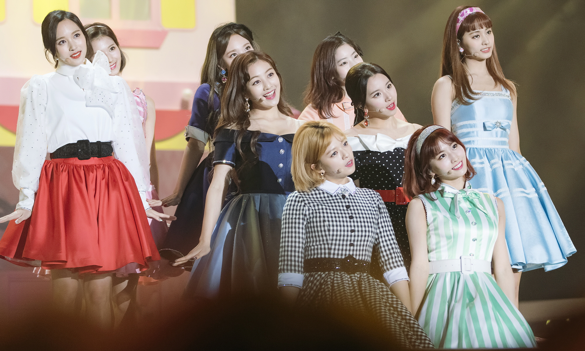 171202 멜론뮤직어워드 트와이스